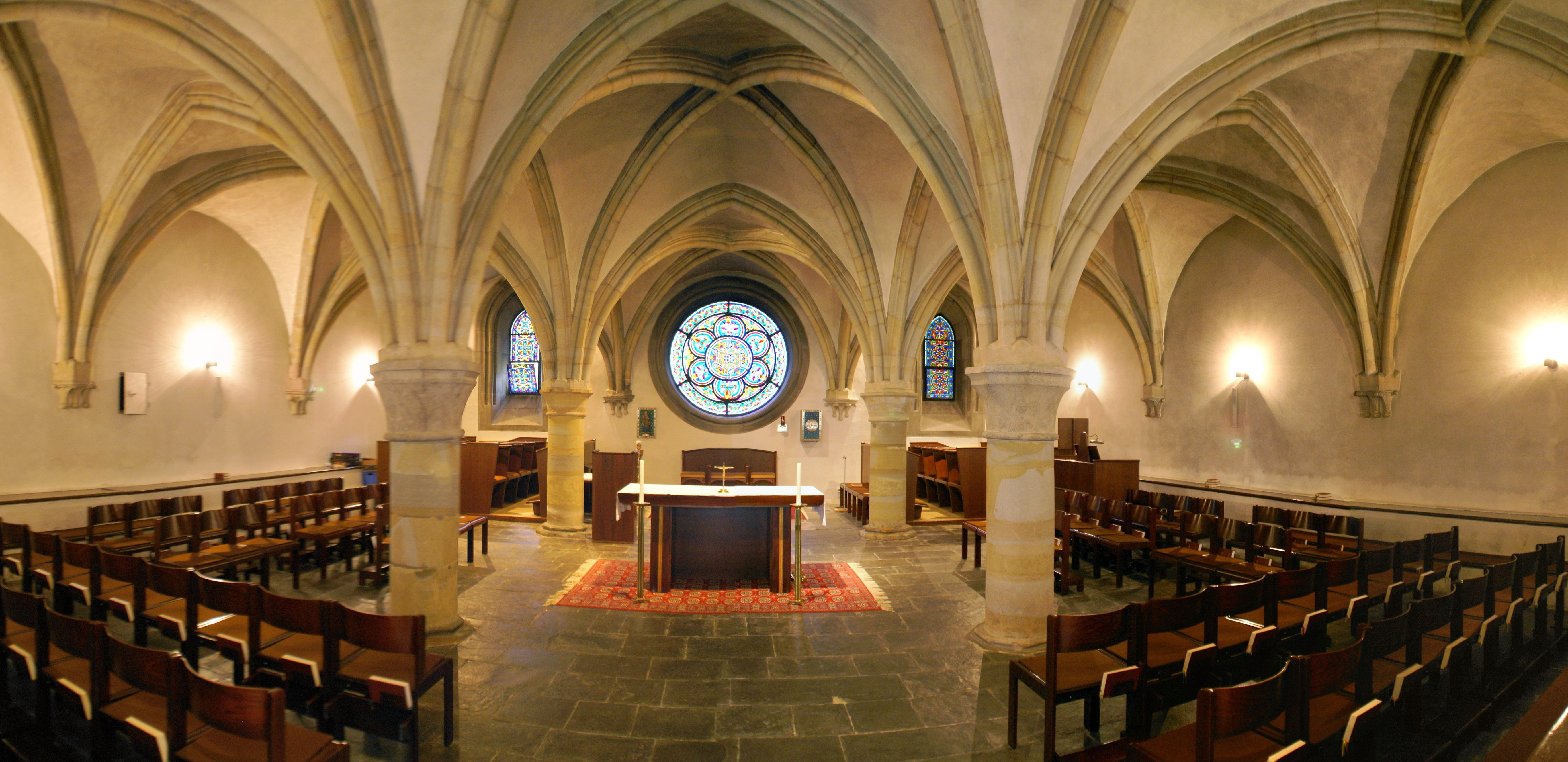 Kapitelsaal